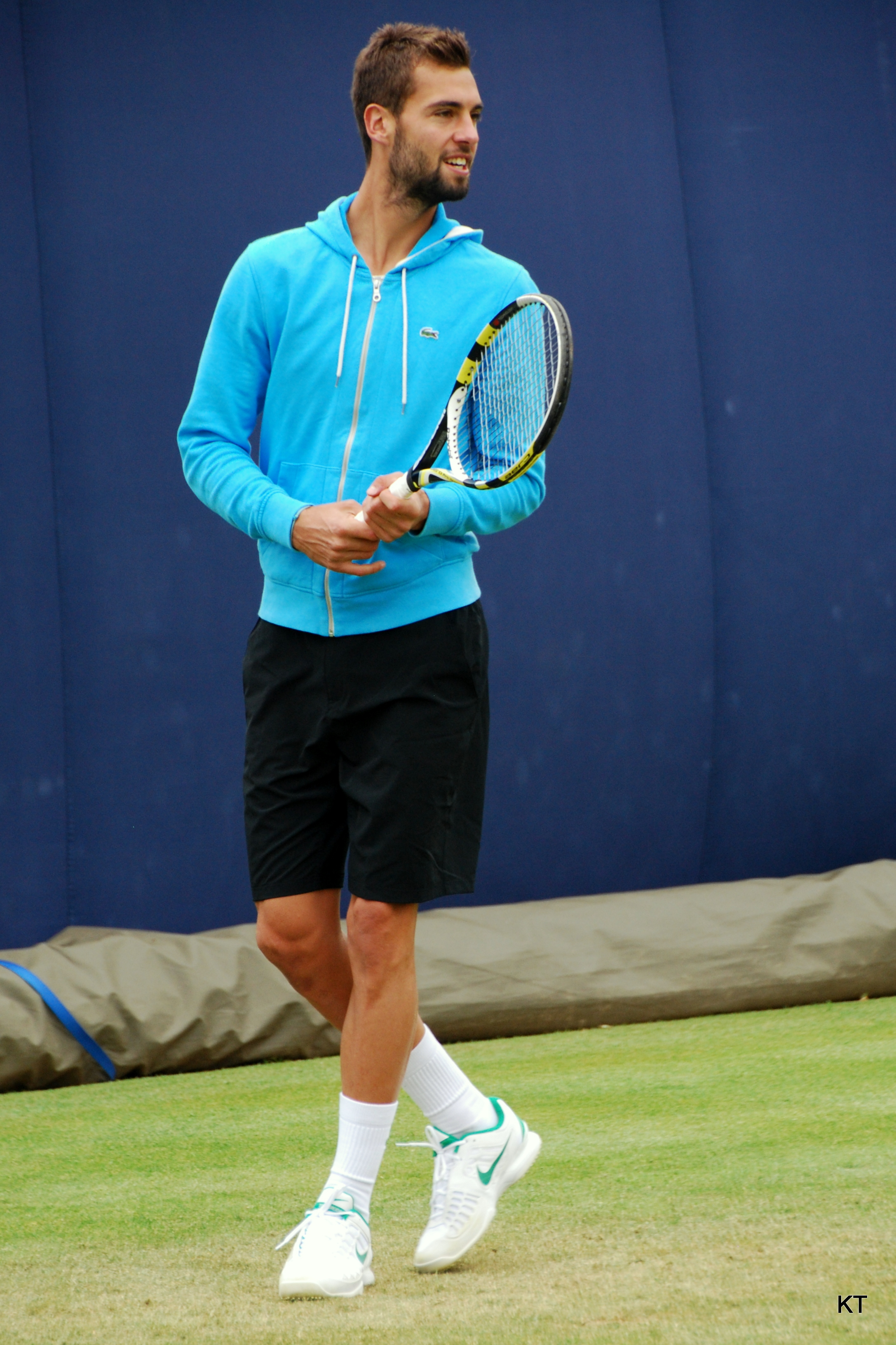 Benoit Paire